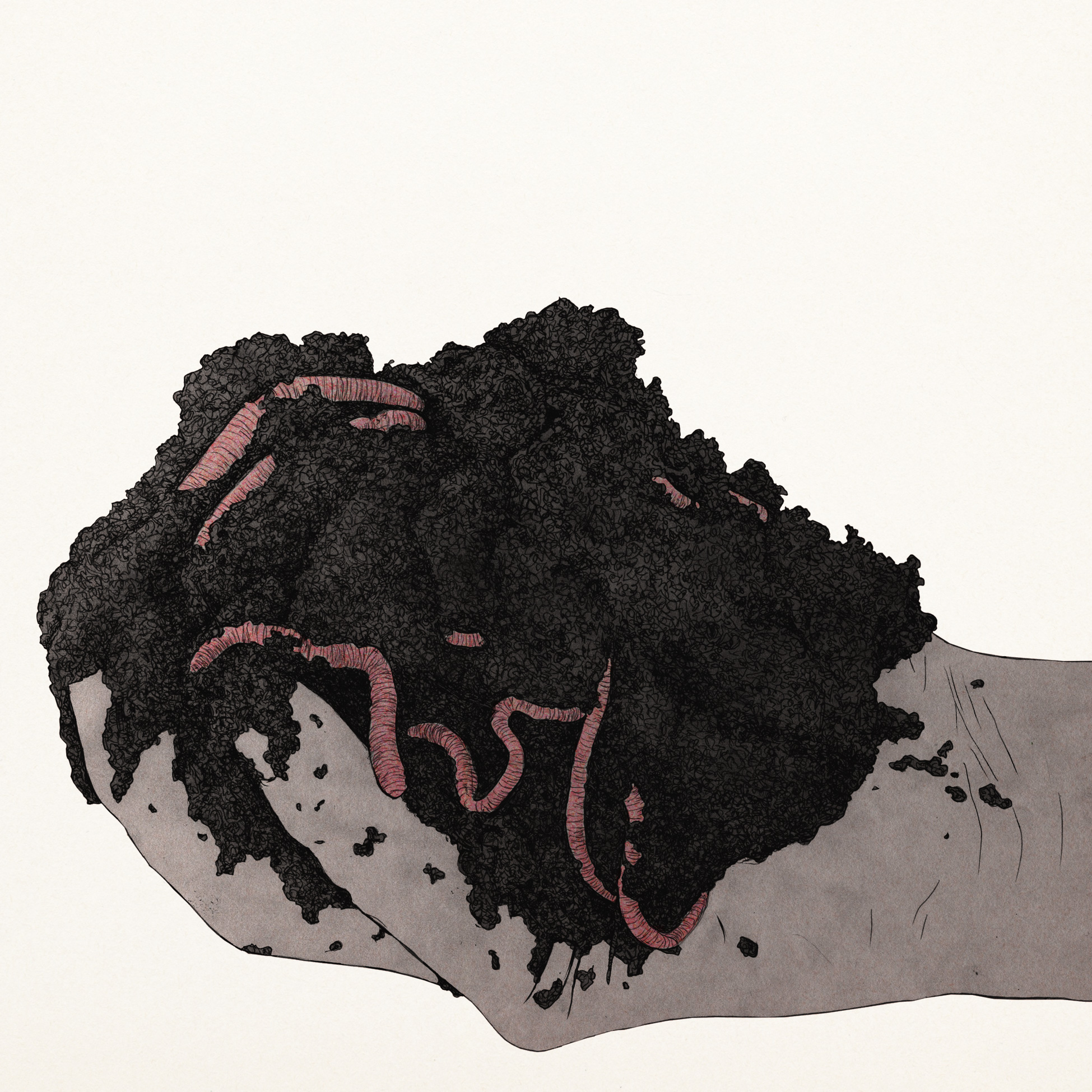 Ma d'un agricultor amb un grapat de fems